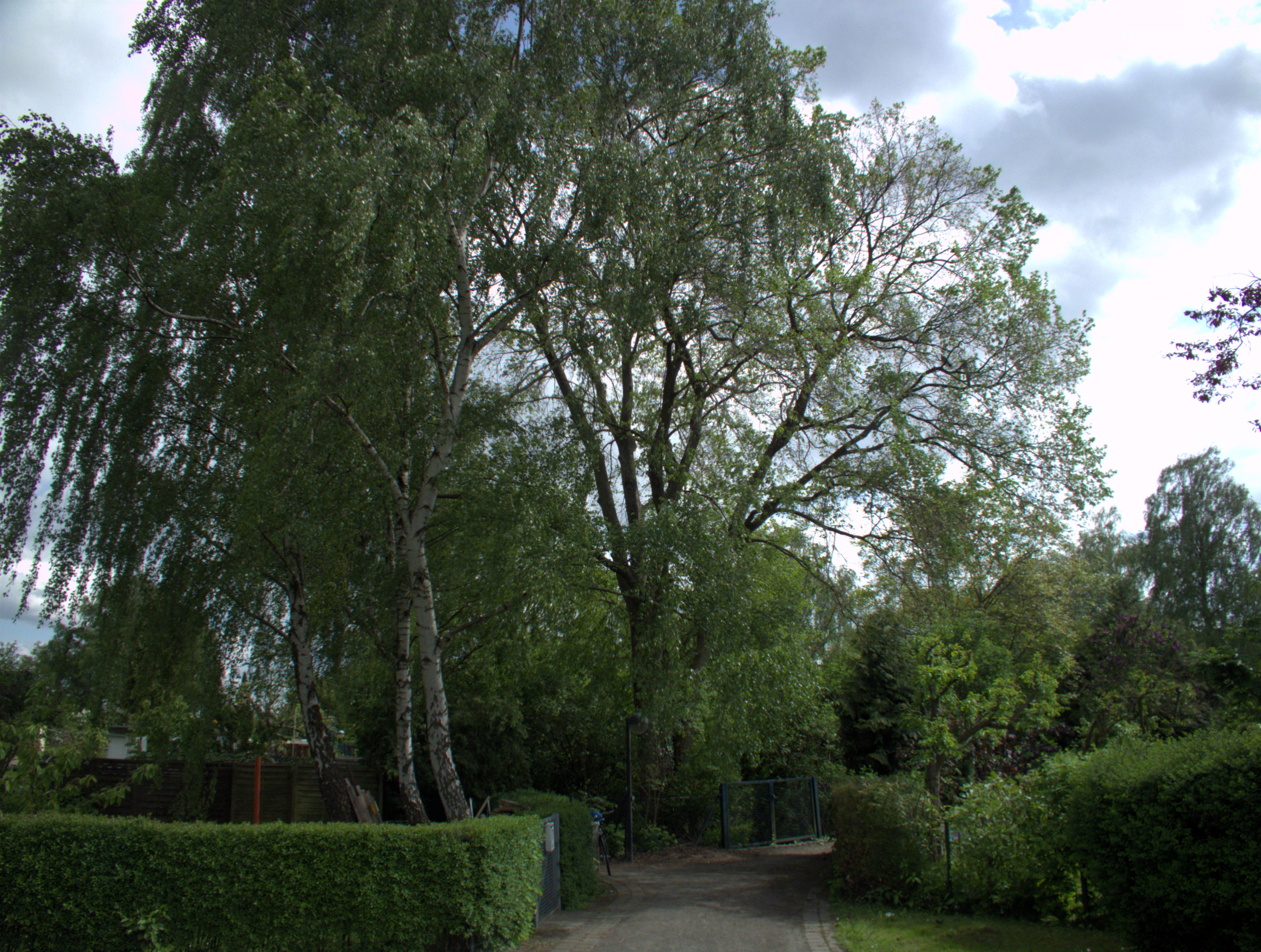 Der Papenpfuhl ist ein Gewässer, das nur selten Wasser führt. Der Pfuhl wurde 1624 erstmals als Pfarrpfuhl erwähnt.. Seit der Gründung der umliegenden Kleingartenkolonien zwischen 1925 und 1926 hat sich die Pfuhlsenke kaum verändert.